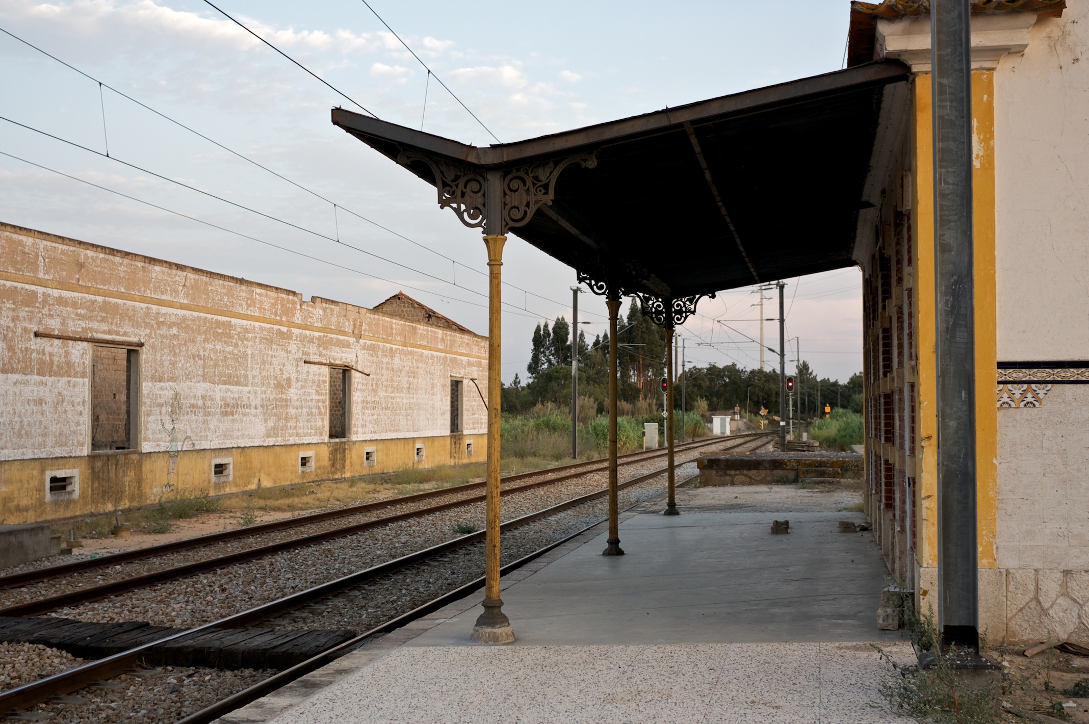 Tipo: ES [Estação Satélite] Local: Agolada [Linha de Vendas Novas, PK 27] Data e hora: 8 de Setembro de 2009 [19h38]